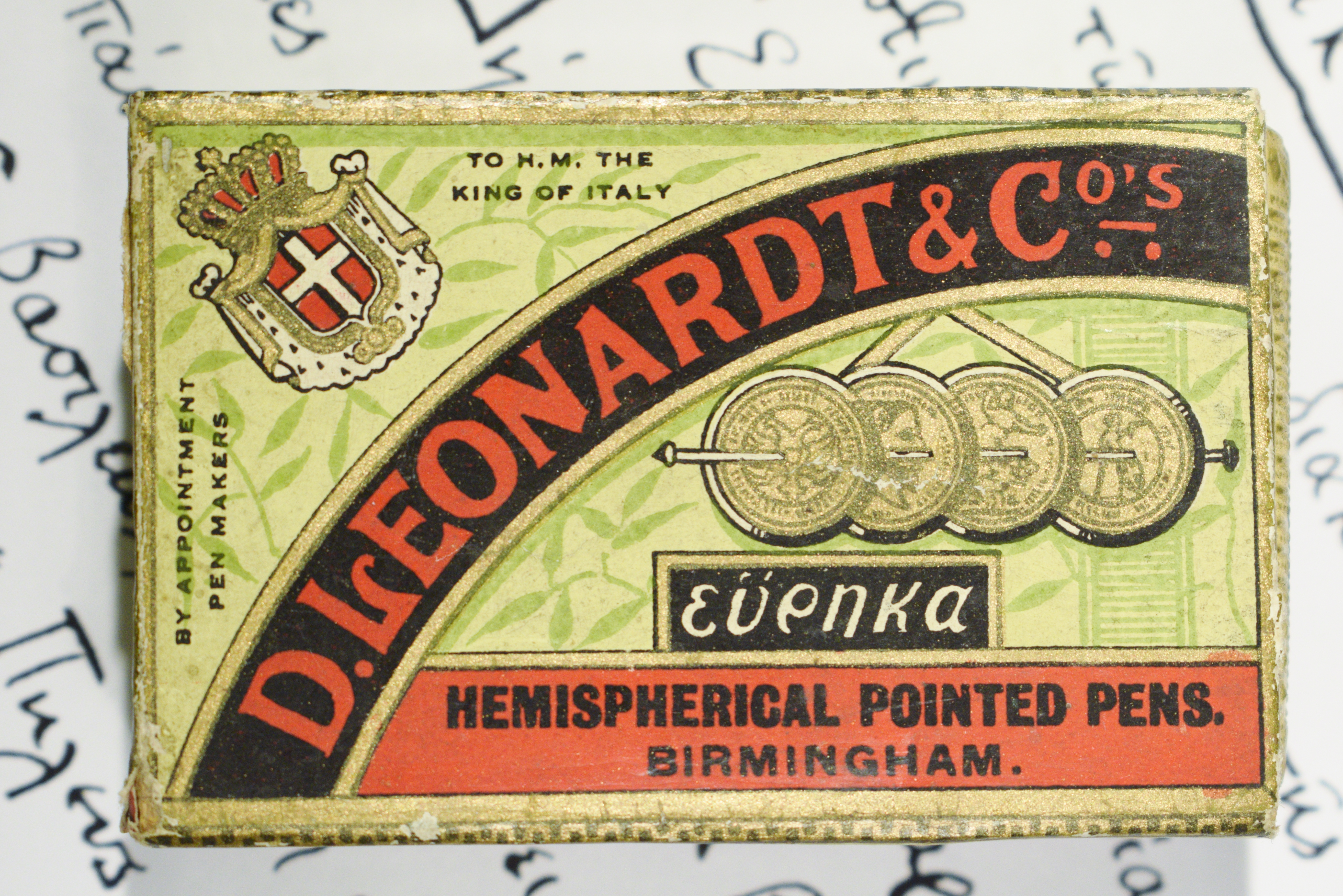 Capsa de plomes.